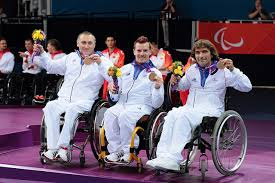 Jean-Philippe Robin avec ses équipier en bleu Pascal VERGER, Michel PEETERS a Londres 3eme par équipes en 2012